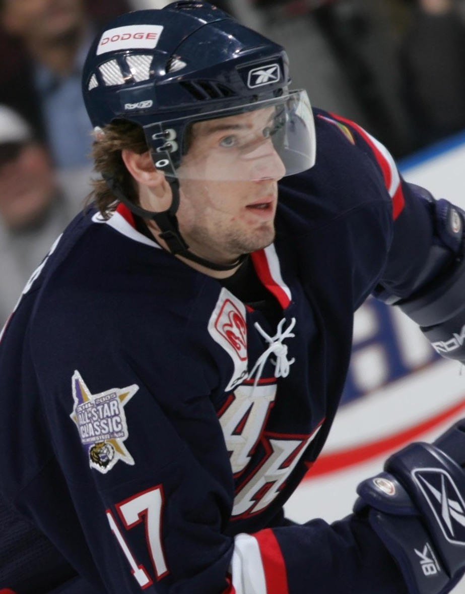 Photo: Jim McIsaac/AHL